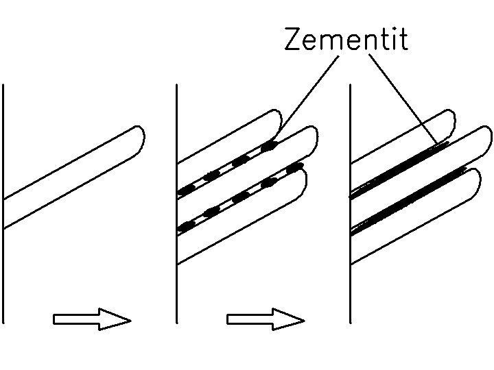 Bild 2.21 Schematische Darstellung der Karbidausscheidung im oberen Bainit